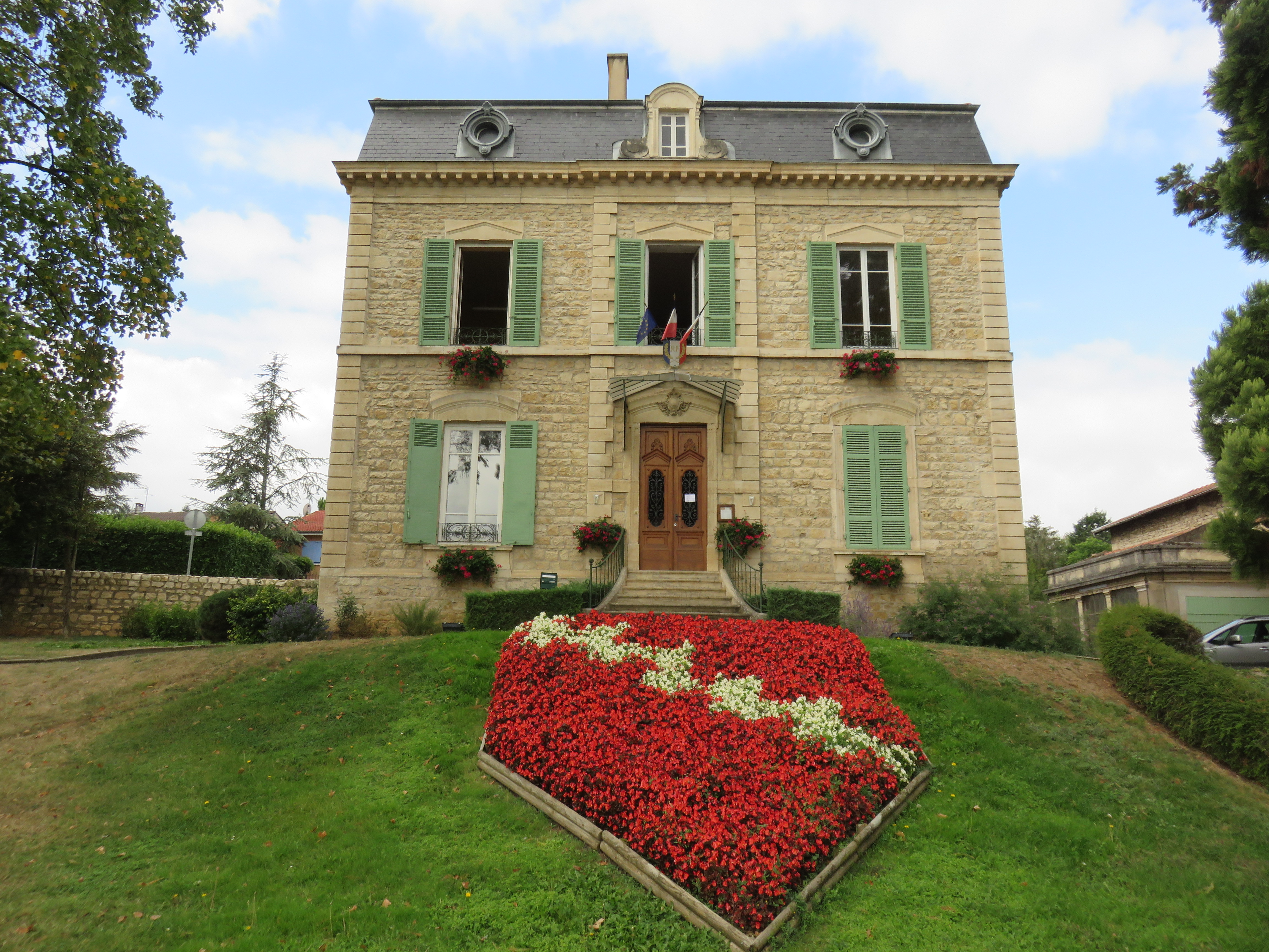 Mairie de Lucenay (Rhône, France).